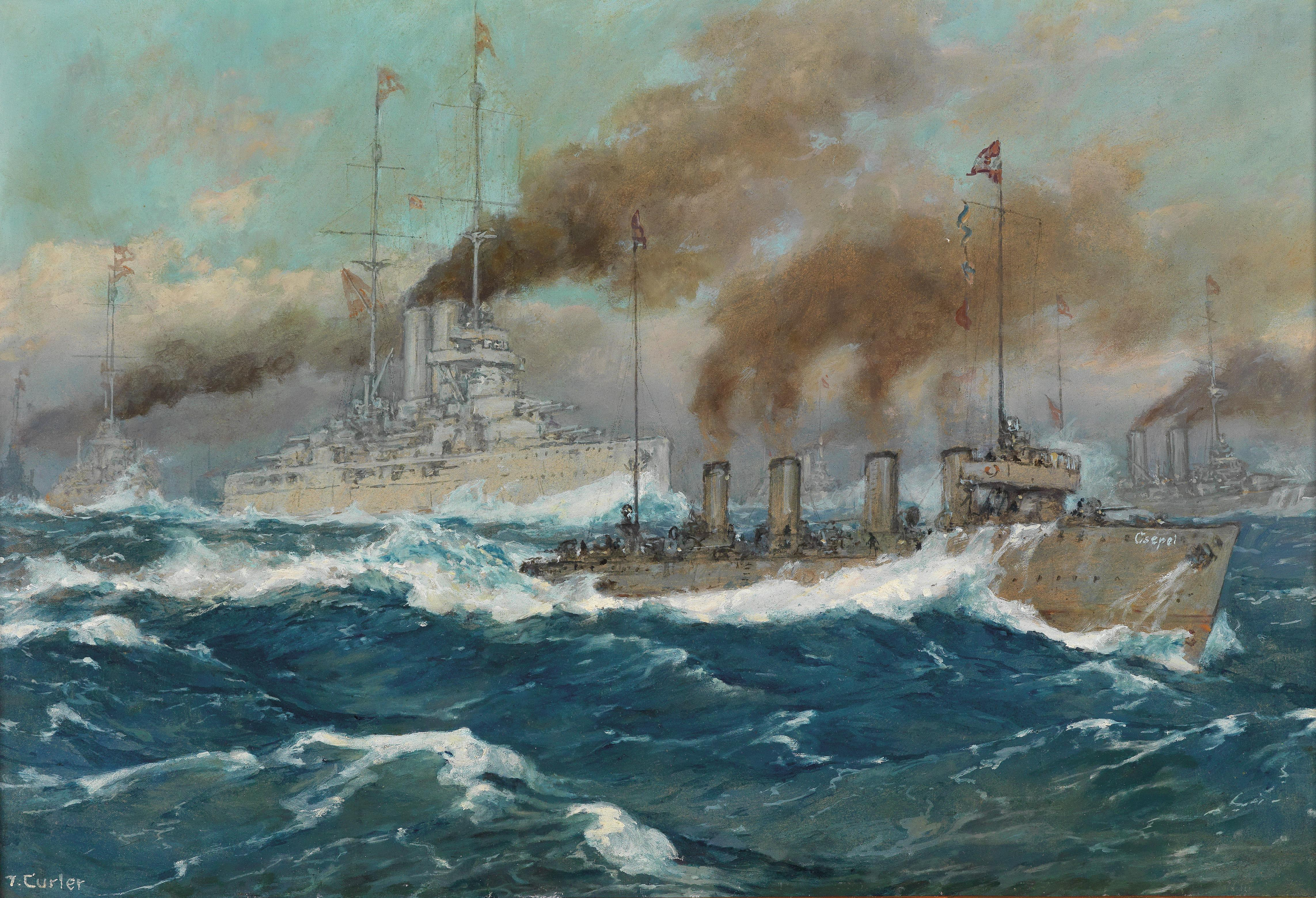 Ausfahrt der K. u. K. Kriegsmarine, Öl auf Karton, signiert "T. Curler", 71,5 x 49 cm, gerahmt, 1. Drittel 20. Jh., im Vordergrund SMS Csepel